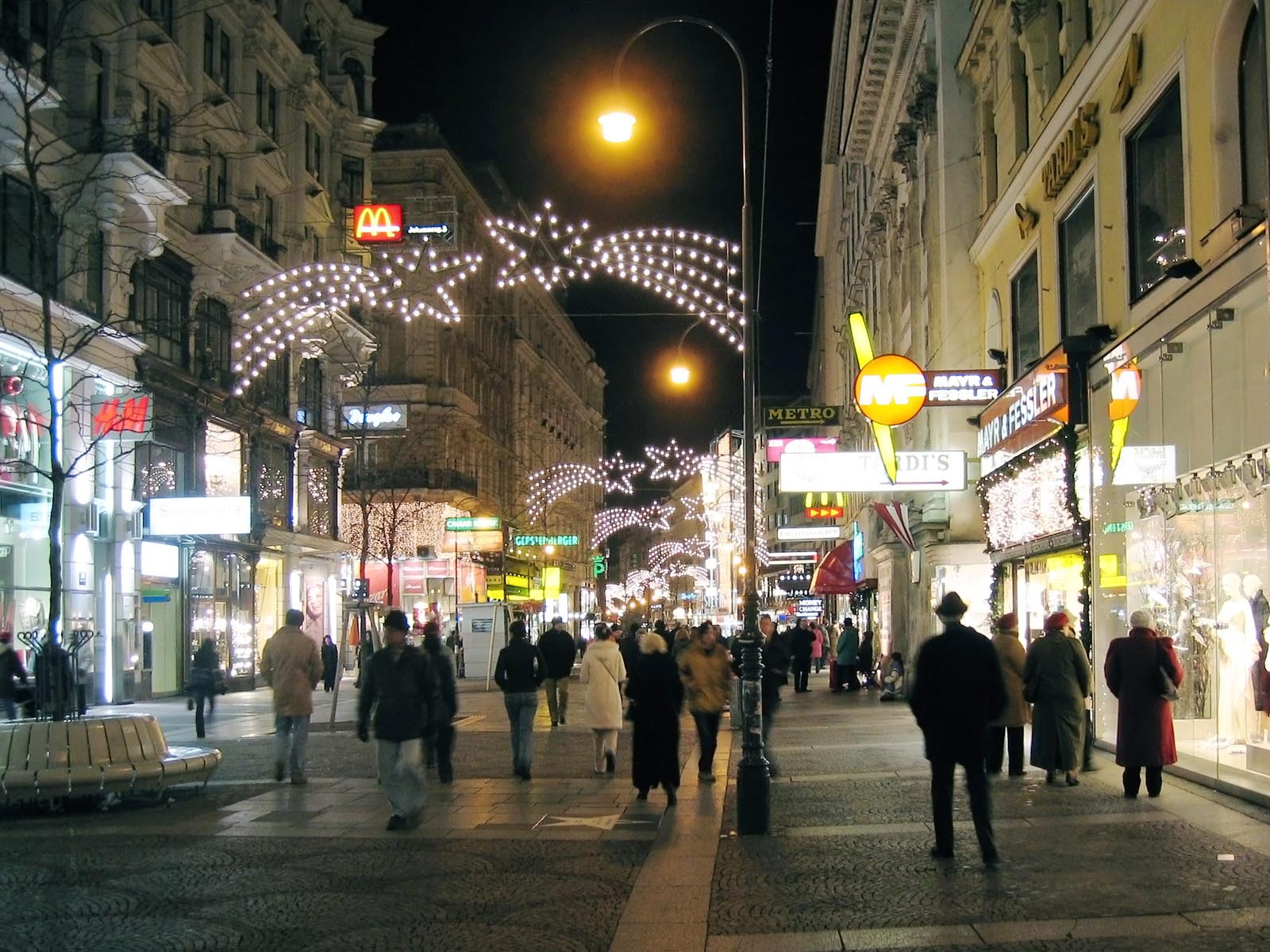 Wien, Kärntnerstraße in December 2005.